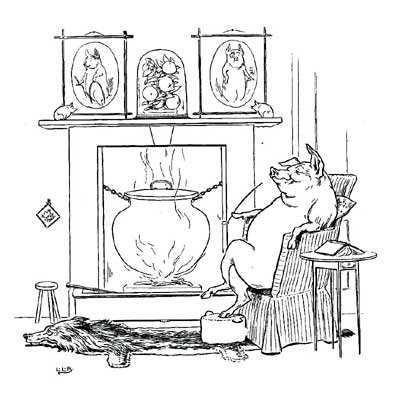 L. Leslie Brooke, Les trois petits cochons : enfin la paix !